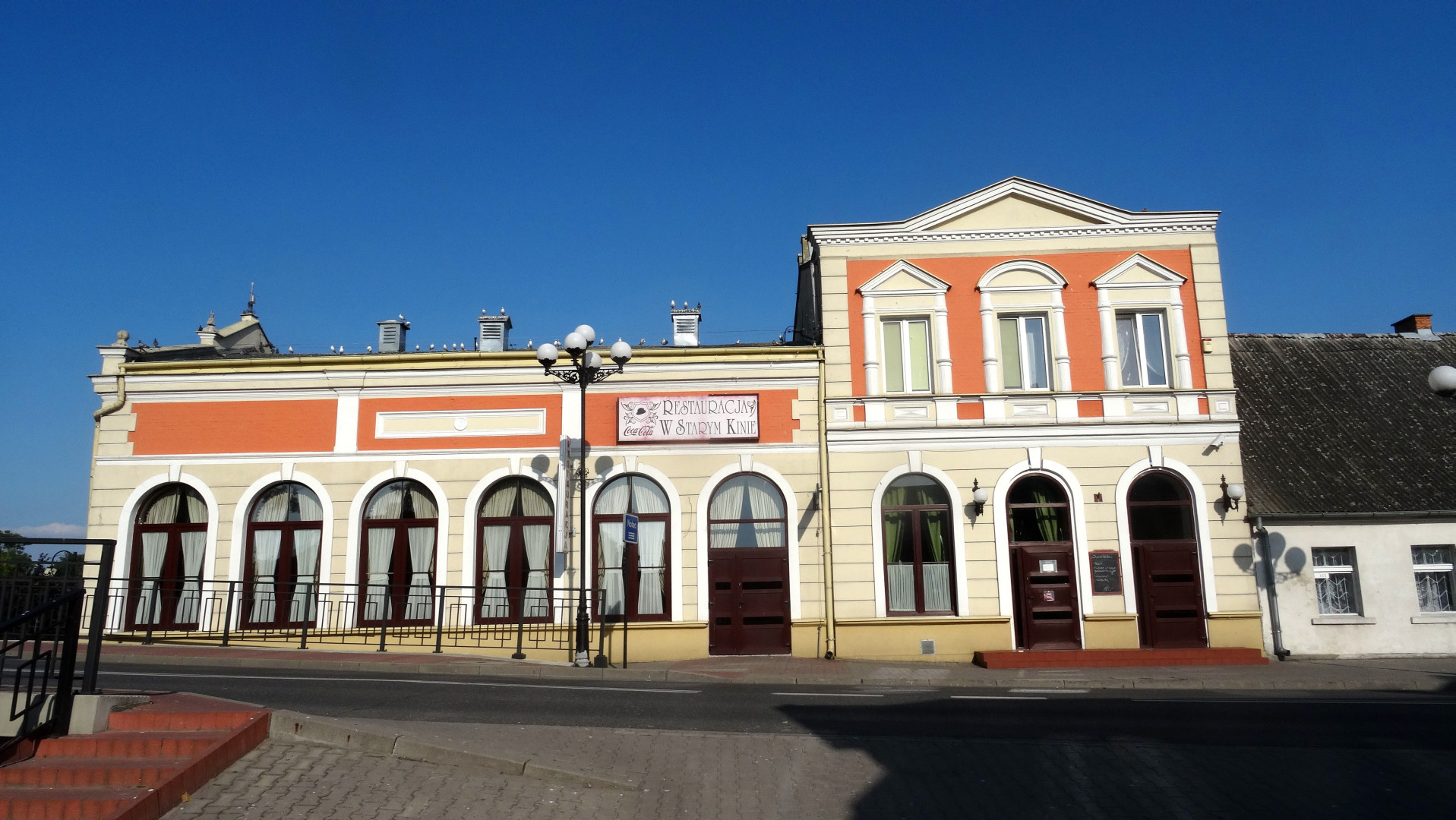 Restauracja "W Starym Kinie" w Barcinie